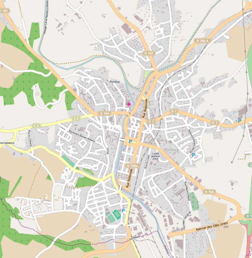 plan de la ville de Pontivy créé à partir des données du projet openstreetmap (logiciel libre de droits)